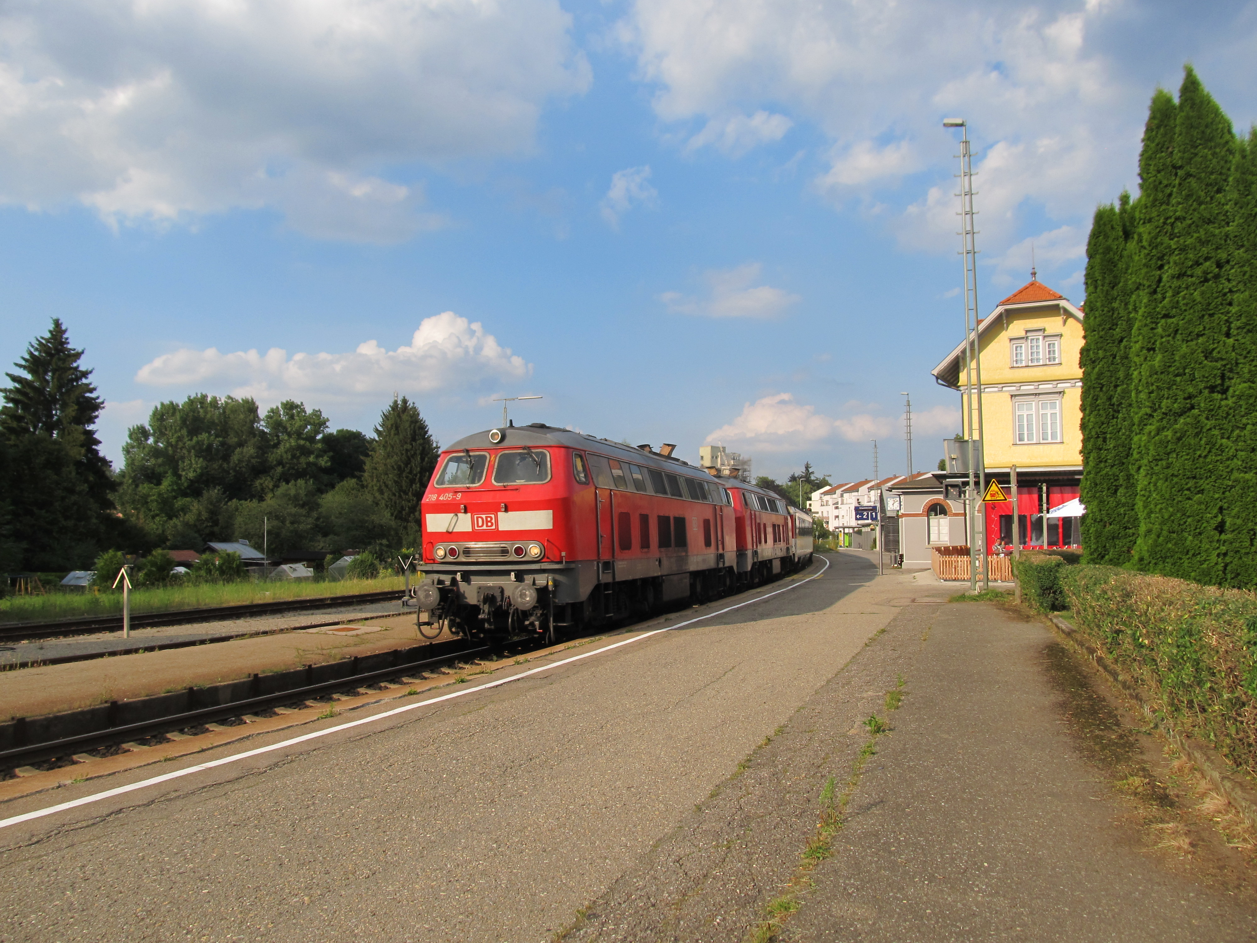 Durchfahrt eines Eurocitys im Bahnhof Leutkirch